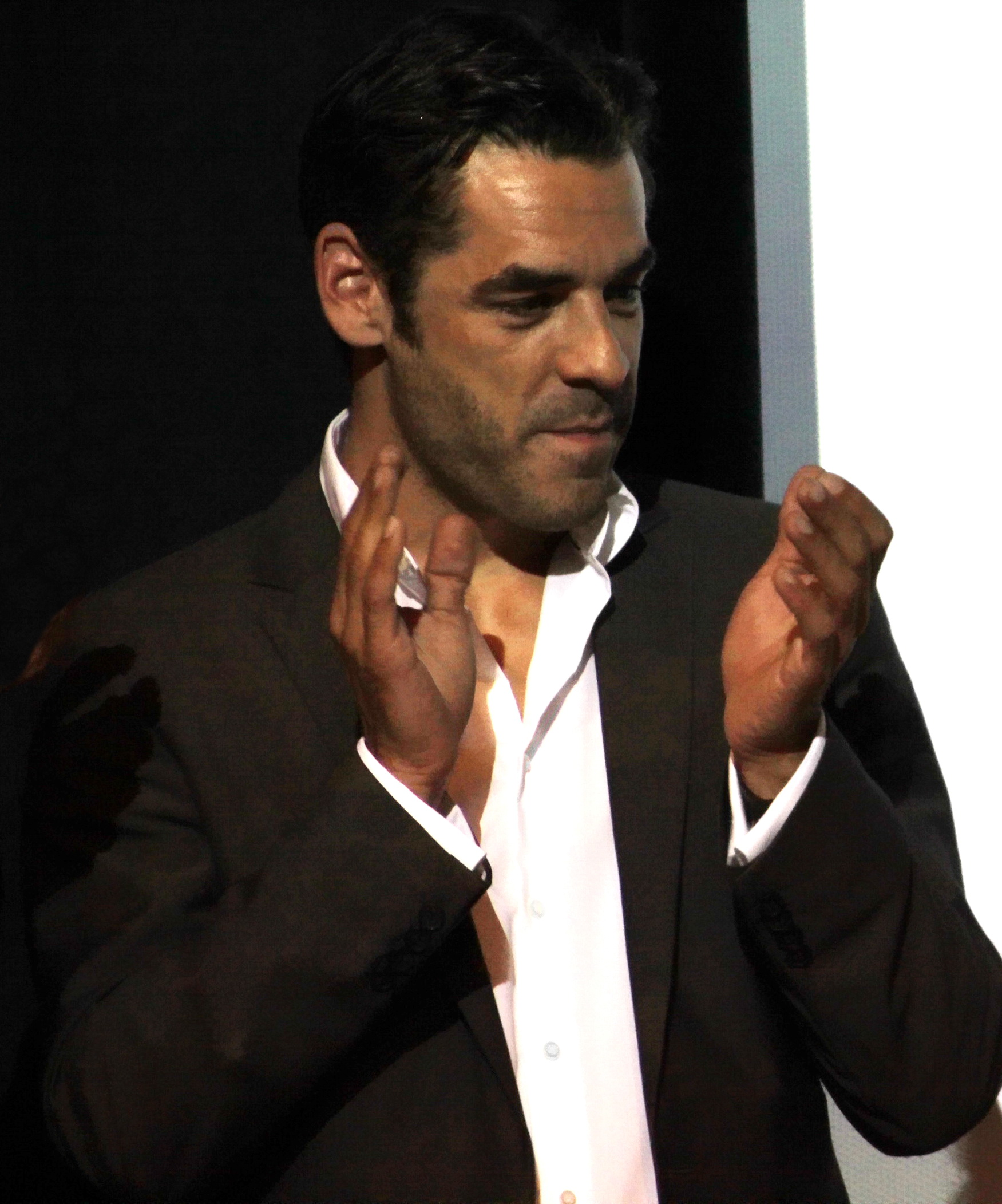 Tobias Oertel - spielte die Person "Breu" im Film "Bamberger Reiter". Aufgenommen bei der Preisverleihung Bernd Burgermeister Filmpreis. Dort war "Bamberger Reiter" unter den für den Preis nominierten Filmen.